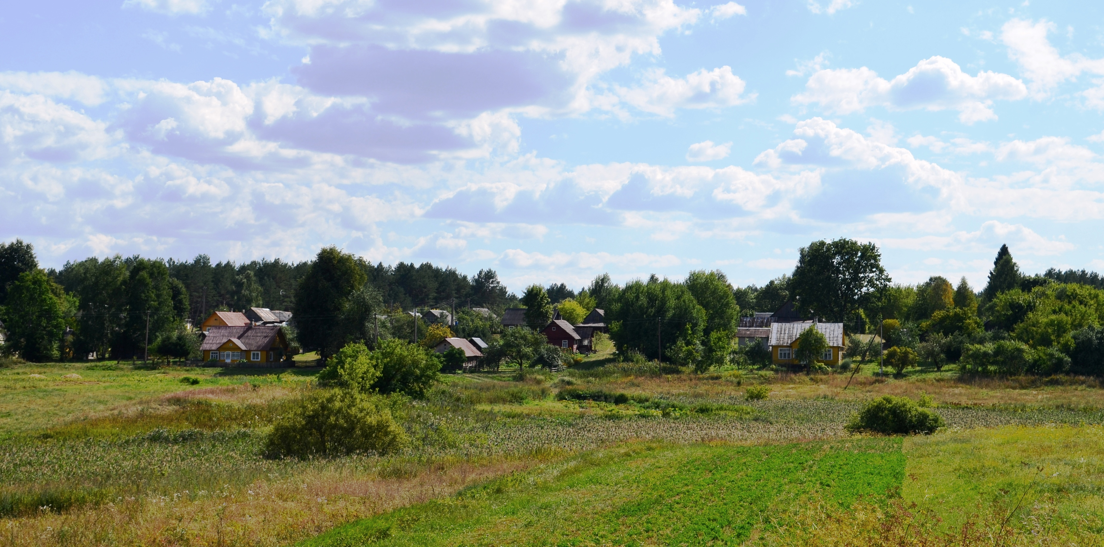 Margionys, Varėnos r.